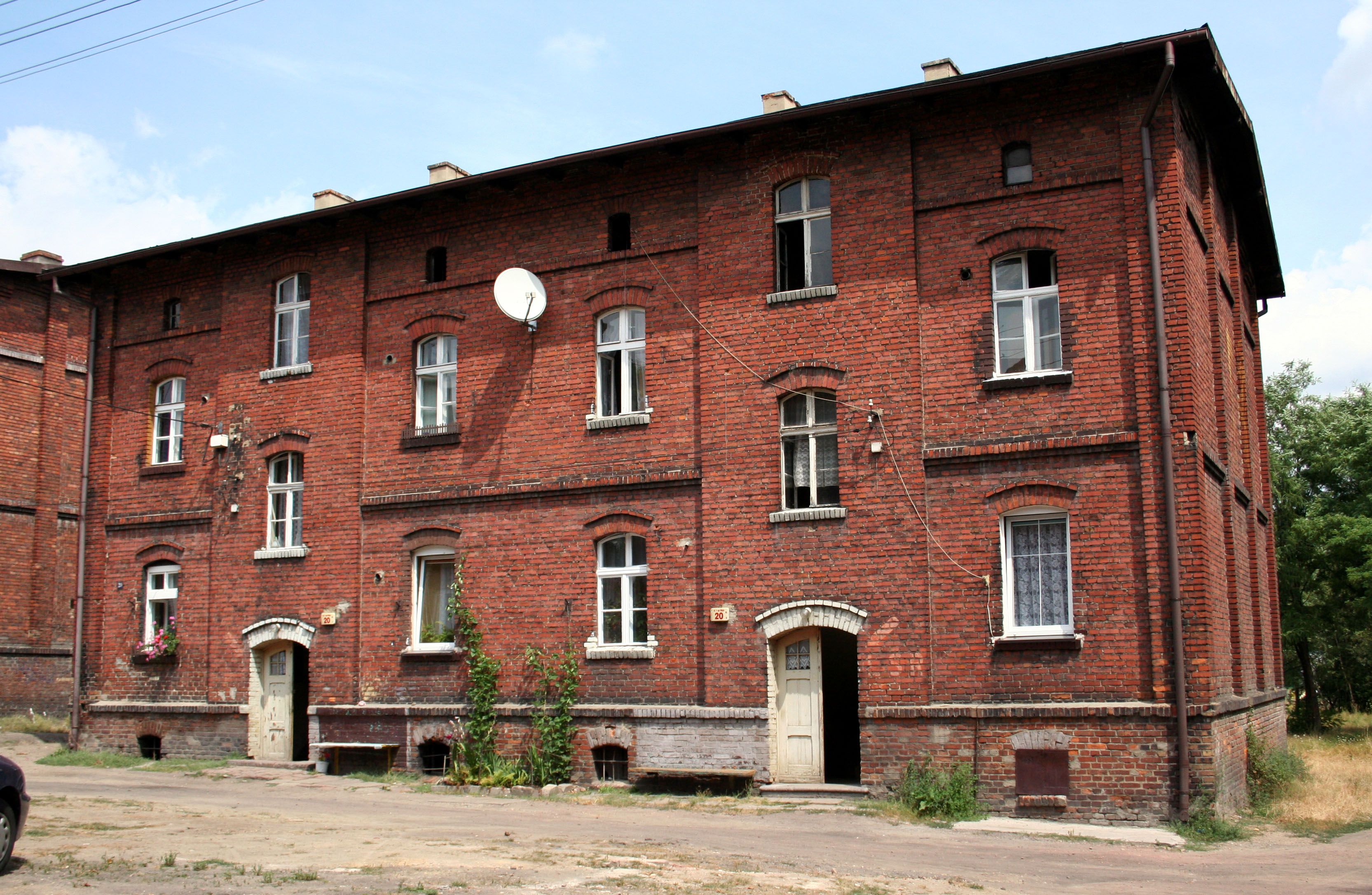 familok w Rybniku-Chwałowicach